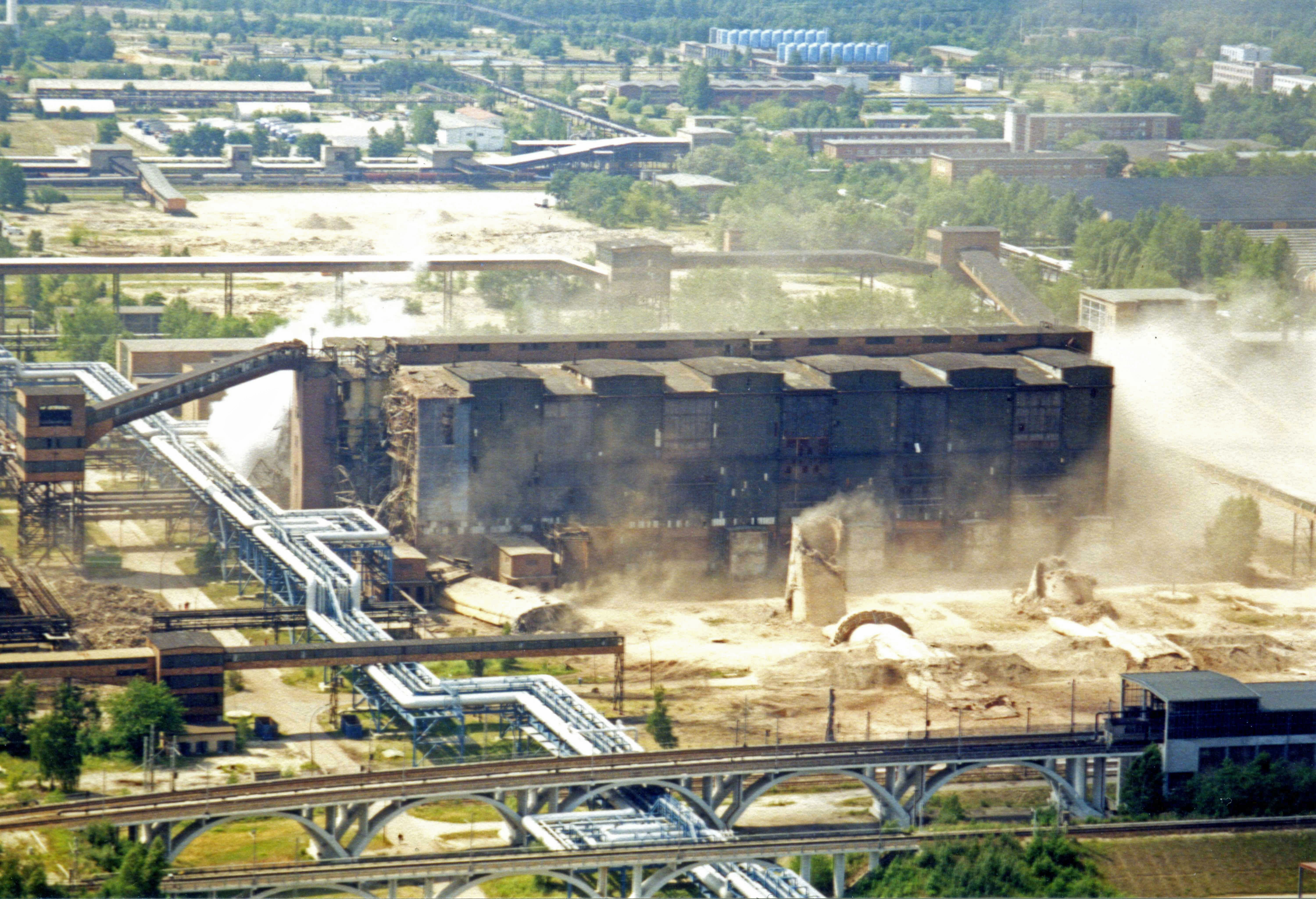 Missglückte Sprengung der Schornsteine des Kraftwerkes West des Gaskombinats Schwarze Pumpe. Bei der Sprengung fielen der westliche und der mittlere Schornstein in die vorher bestimmte Richtung. Der östliche Schornstein blieb erst stehen und kippte dann in die falsche, die südliche Richtung. Dabei wurden sowohl Teile des Kesselhauses des Kraftwerkes West als auch die Prozeßdampf - und Kondensatleitungen des Vattenfall Kraftwerkes Schwarze Pumpe in Richtung Brikettfabrik beschädigt.